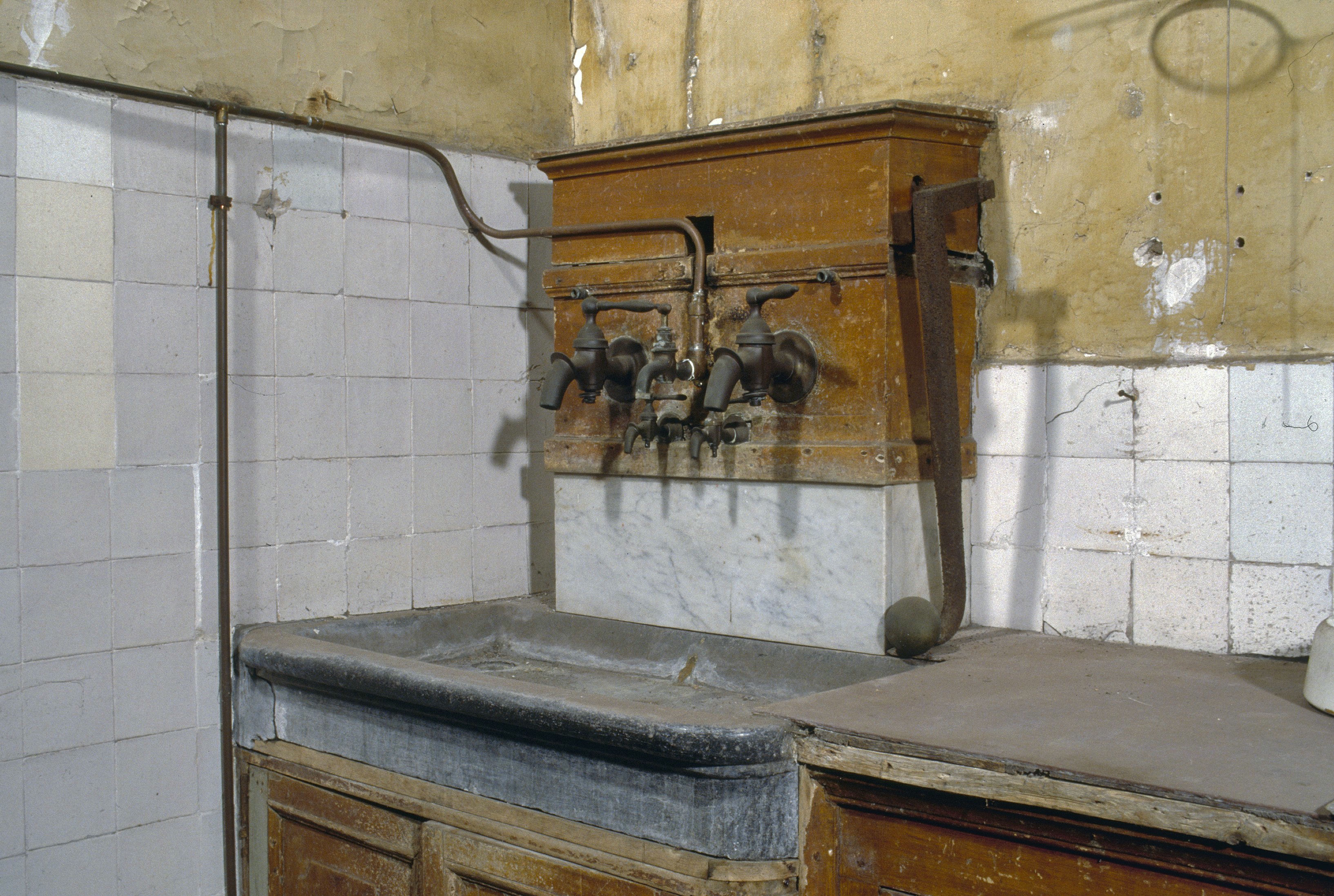 Gootsteen/ Aanrecht: Interieur keuken, aanzicht aanrecht met gootsteen (opmerking: Diacollectie Huub Kurvers)